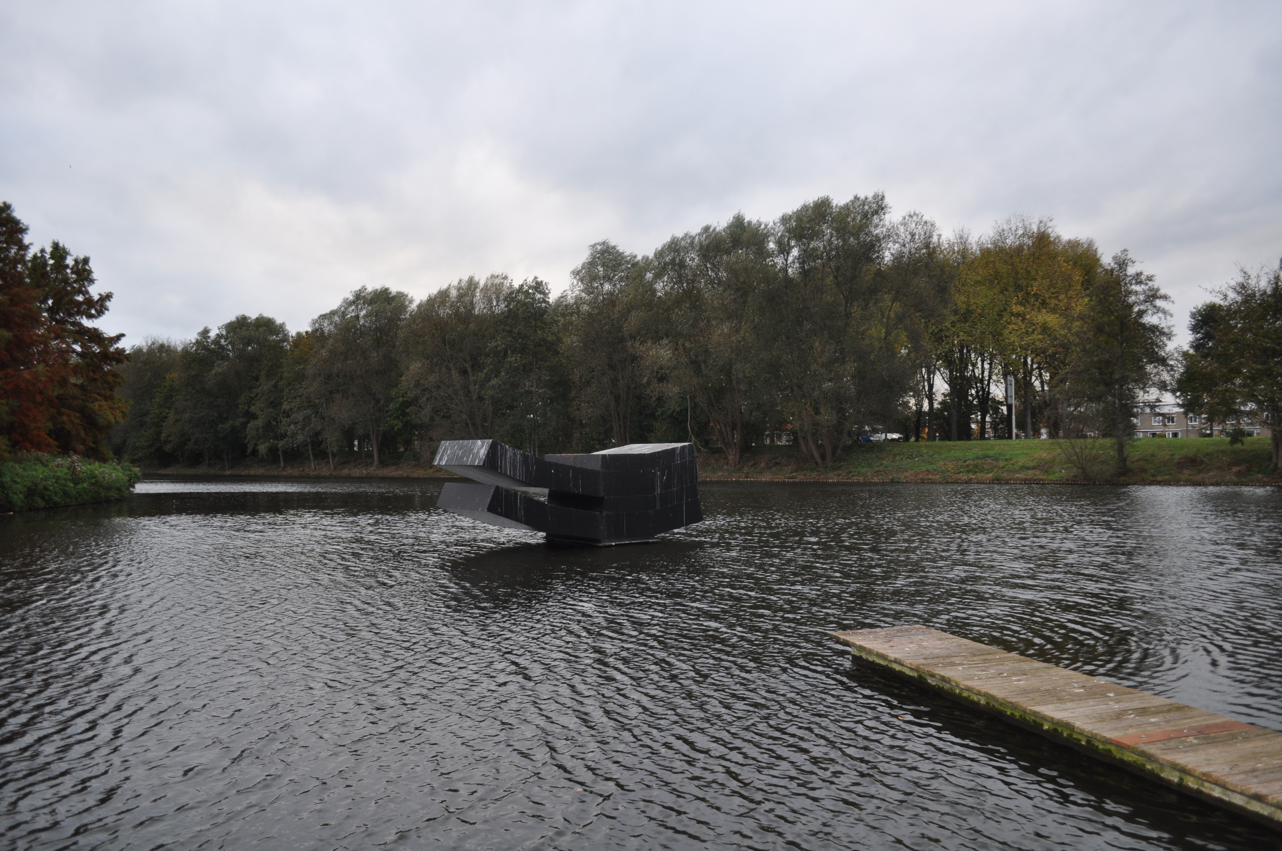 Black Wave Nieuw Sloten Kasterleepark van Lon Pennock